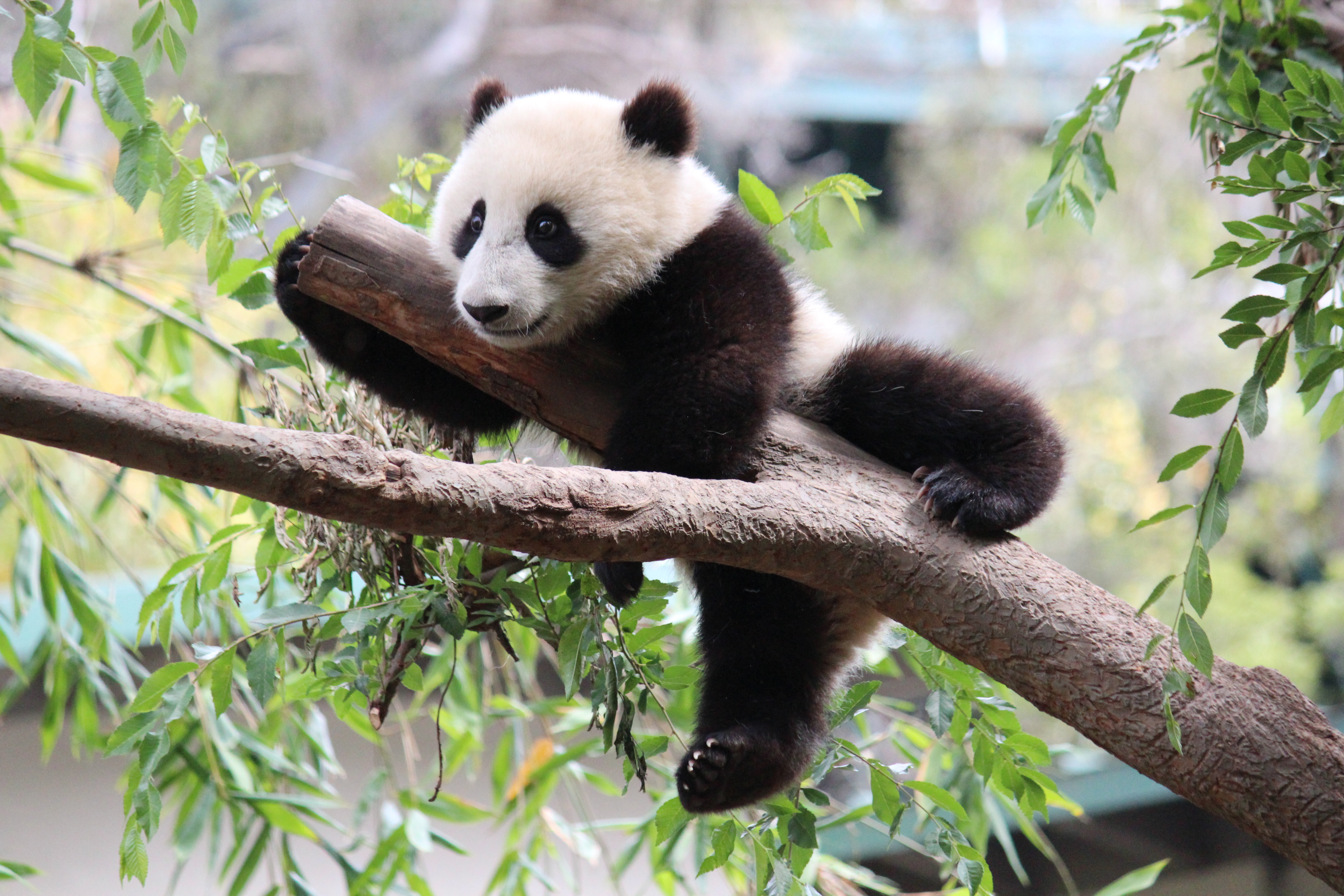 Mai 2013 - Foto: Johann Balleis